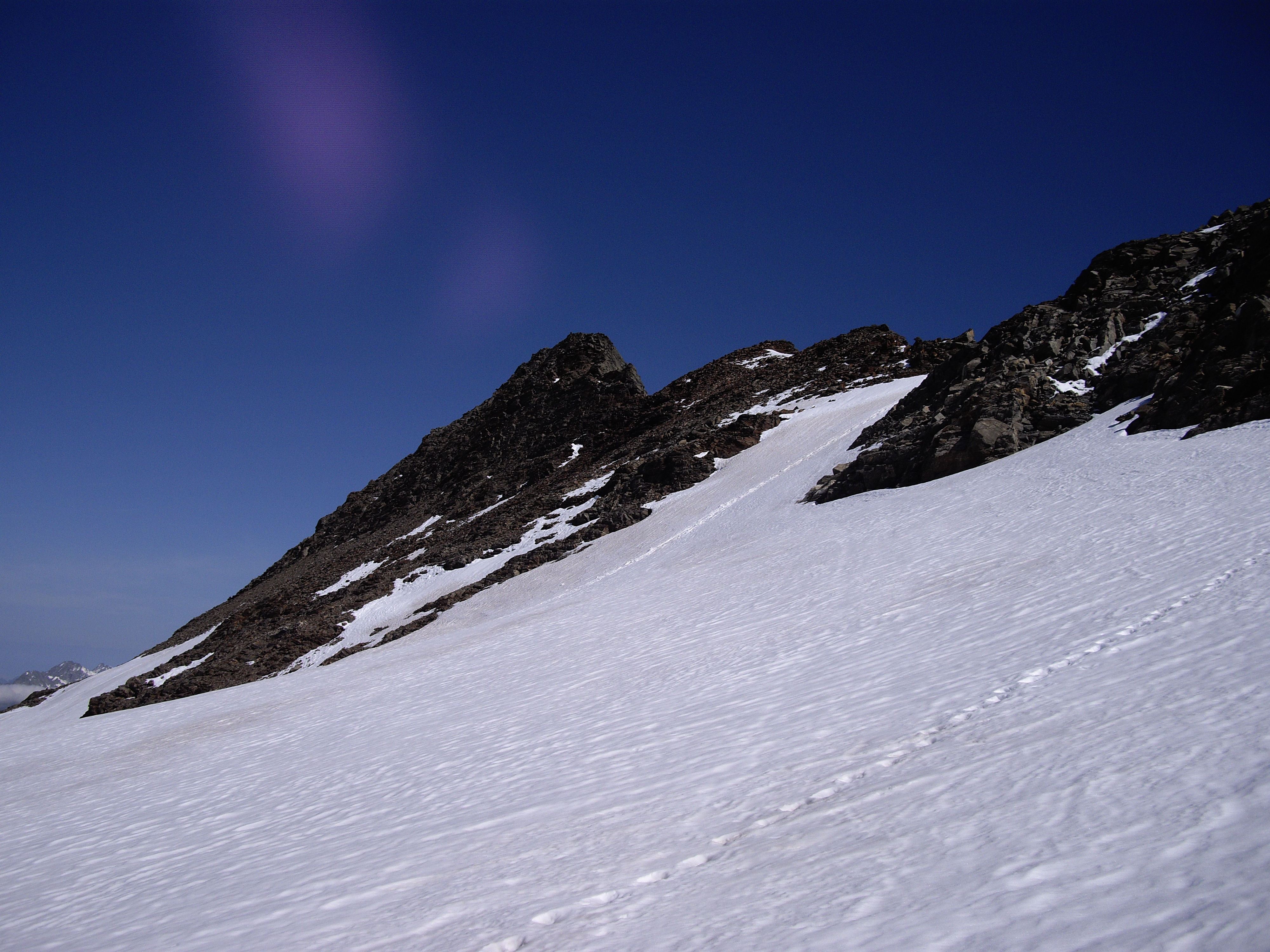 Gipfel des Lenkstein. Von einem Schneefeld unter dem Gipfel.